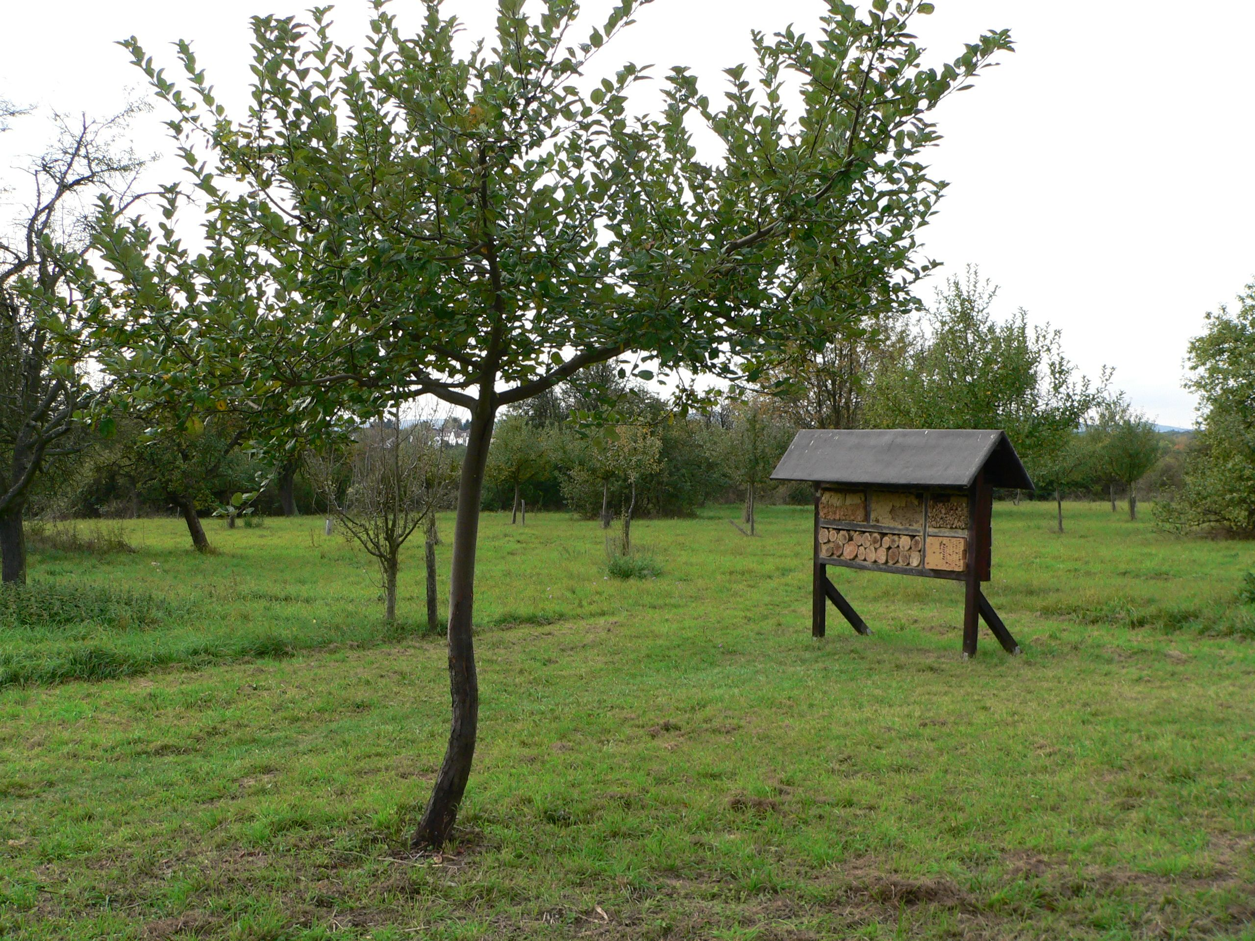 Streuobstwiese mit Nistwand für Insekten im Arboretum Main Taunus